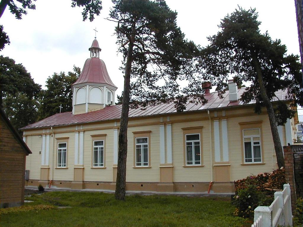 Jūrmala, katoļu baznīca Majoros 2001-09-09